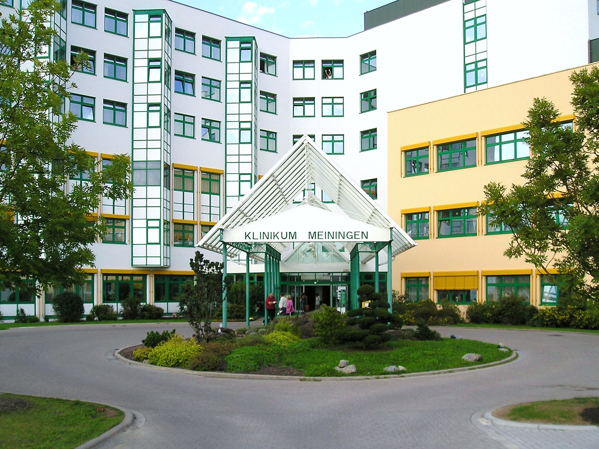 Haupteingang mit kleinem japanischen Garten des Klinikums Meiningen